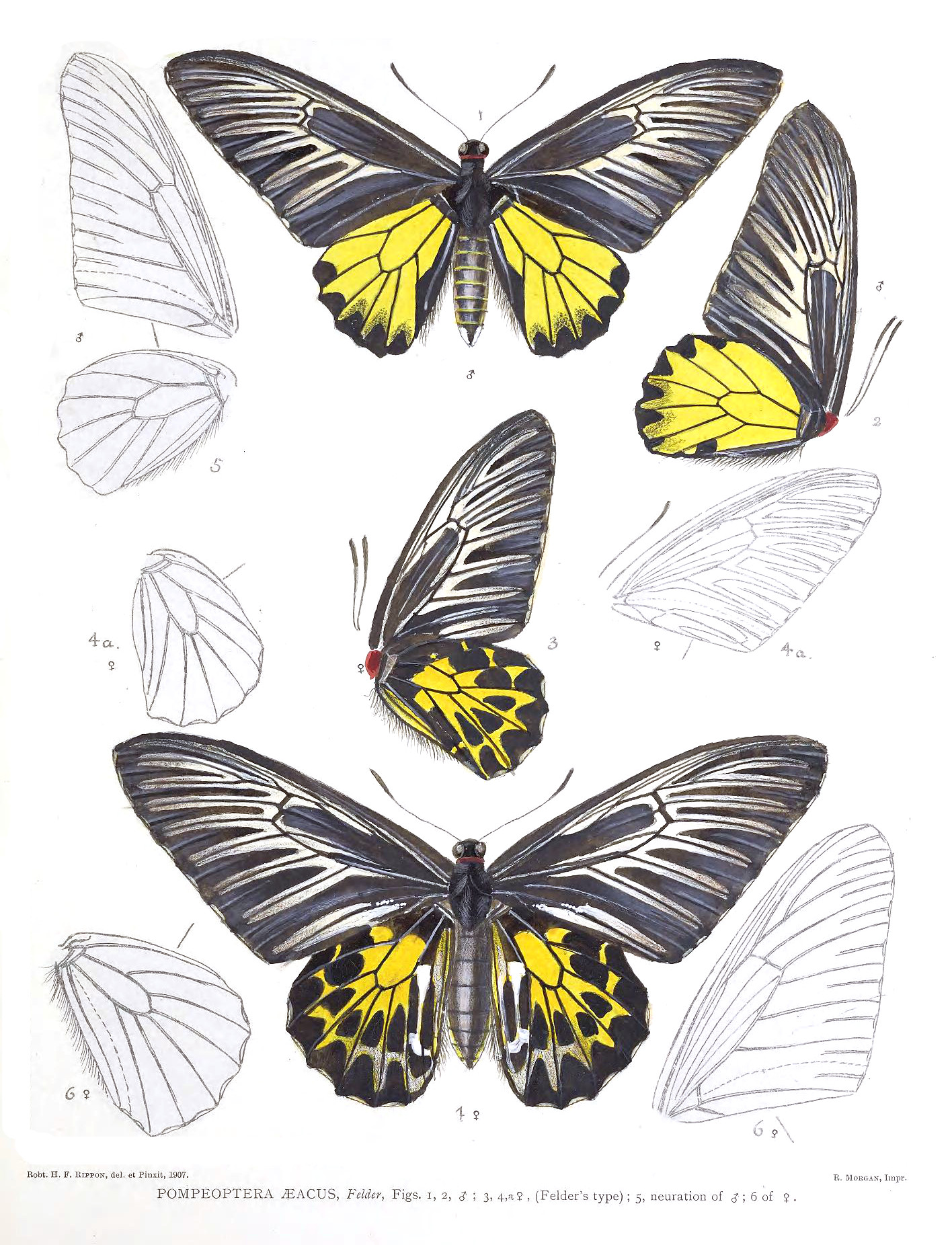 Pompeoptera aeacus = Troides aeacus